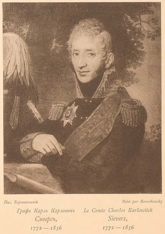 Граф Карл Карлович Сиверс